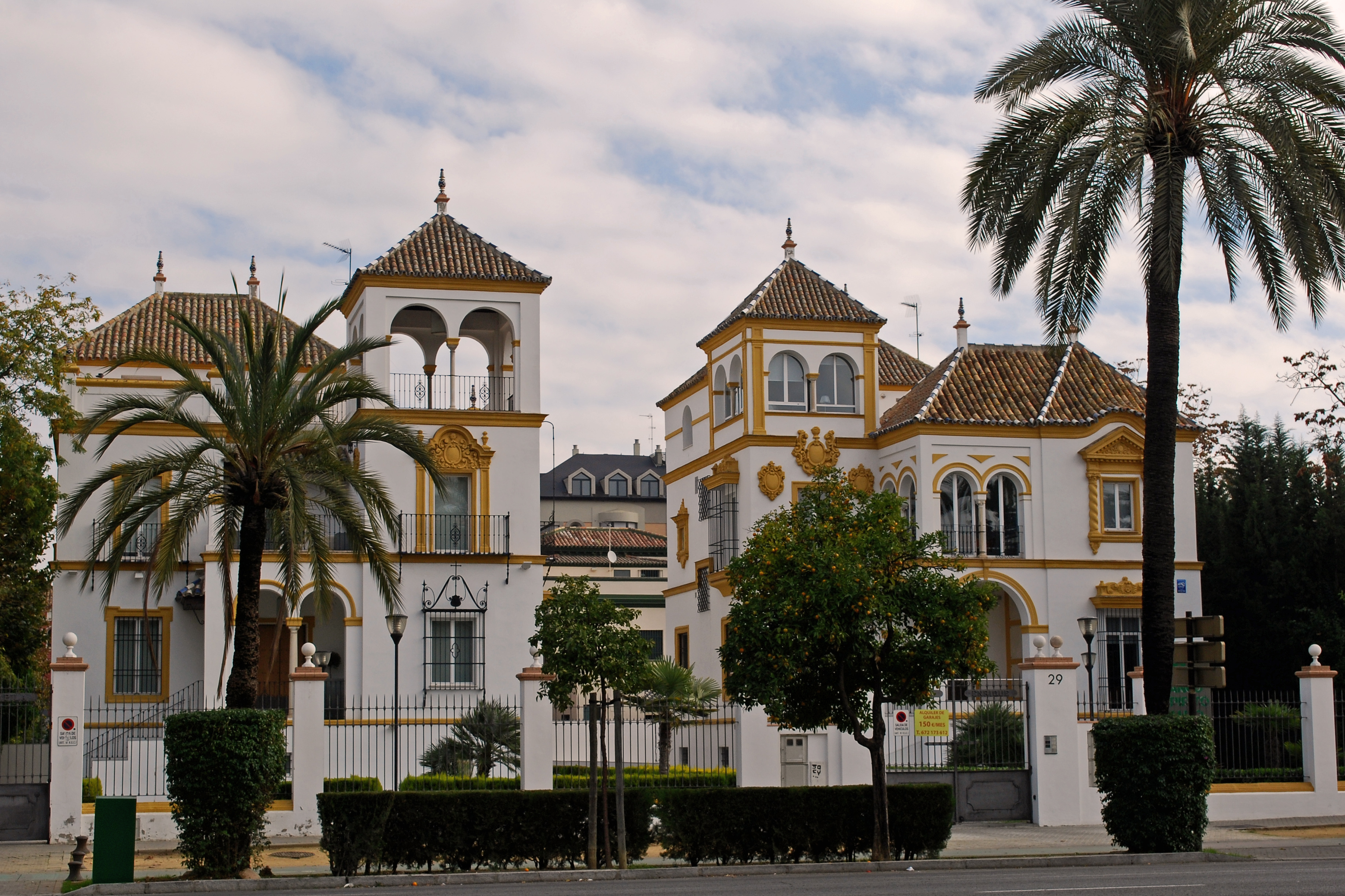 Villa Enrique y Villa Pilar, Avenida de la Palmera número 27 y 29 de Sevilla. Arquitecto Juan Talavera y Heredia. Construción 1922/23